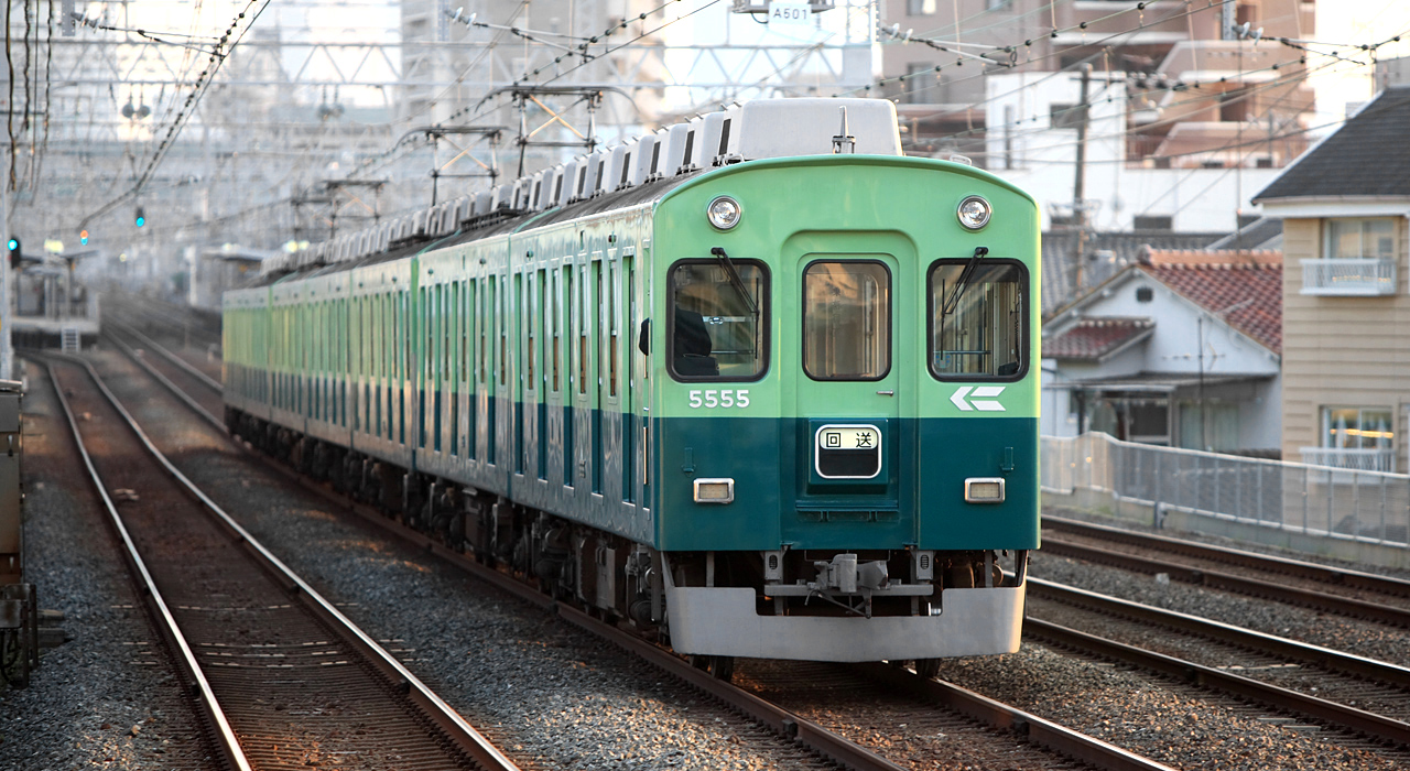 Keihan 5000 Series EMU